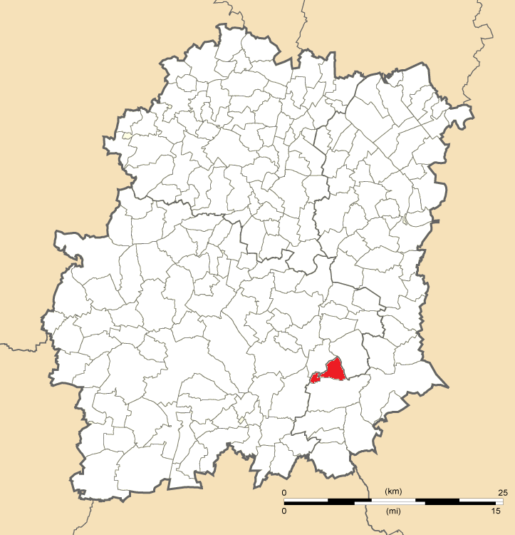 Carte de position de Courdimanche-sur-Essonne en Essonne (91)